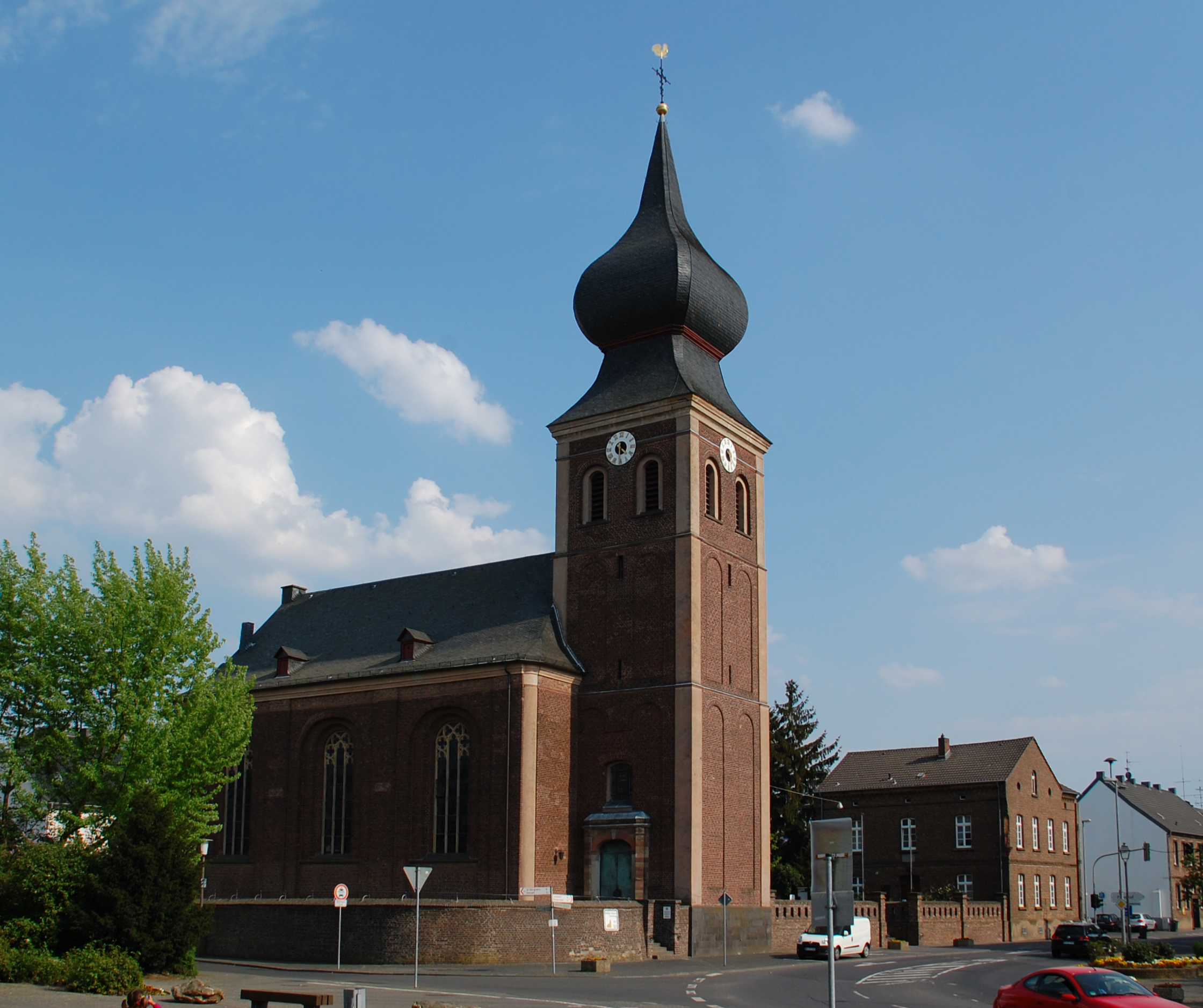 St. Kunibert in Gymnich, Germany